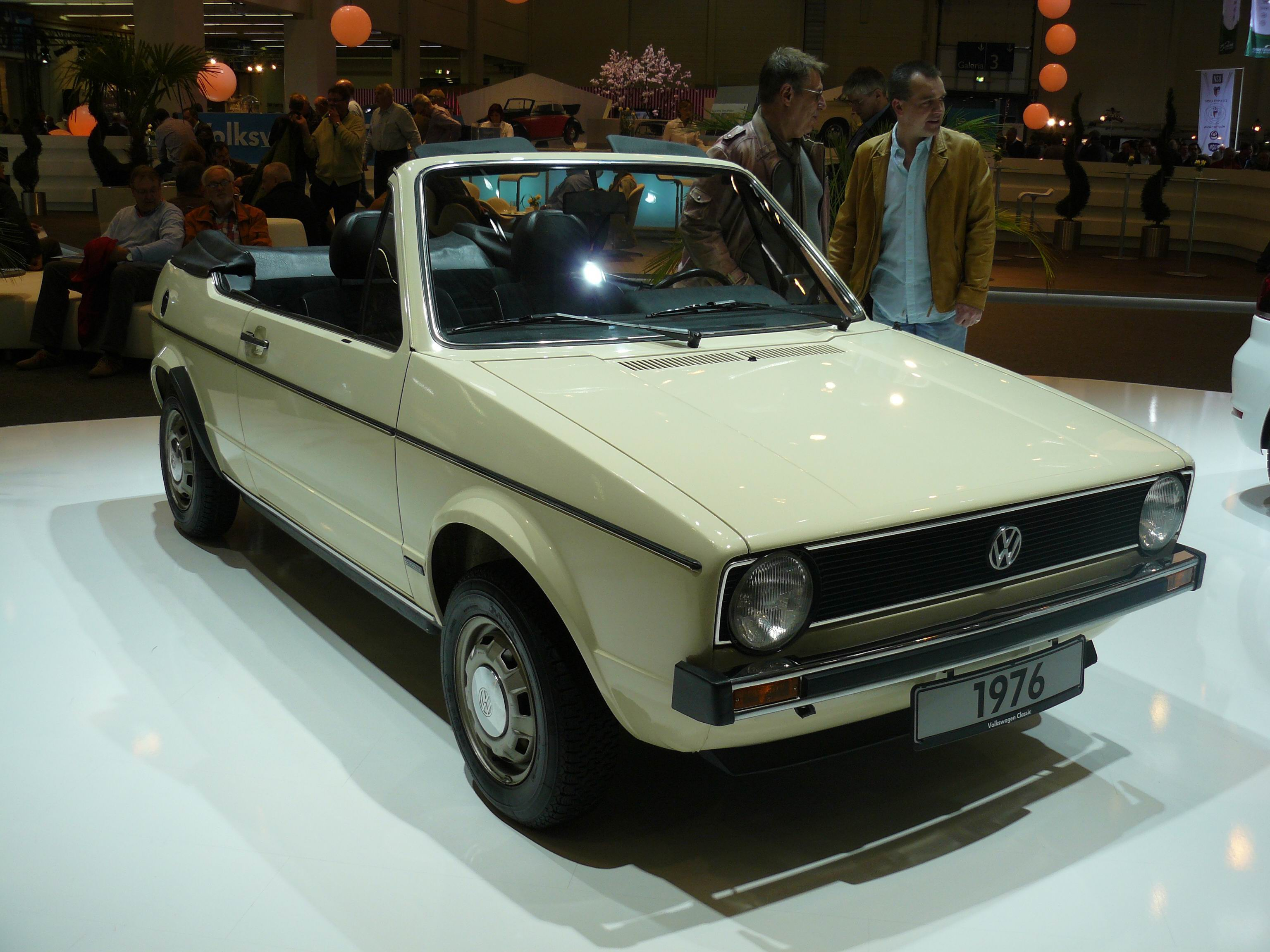 Essen 2011